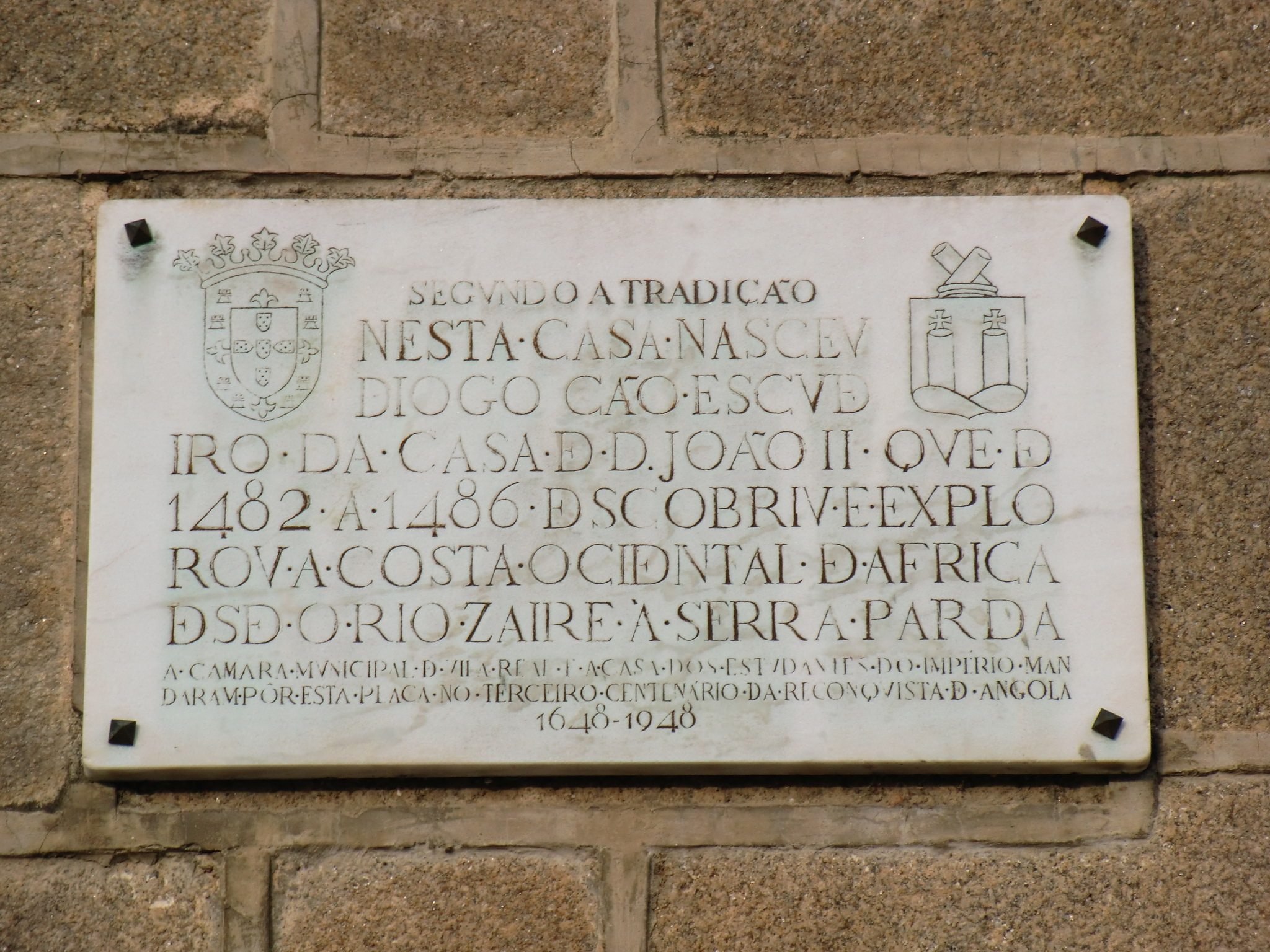 Plaque commémorative sur la maison natale supposée de Diogo Cão à Vila Real (Portugal)